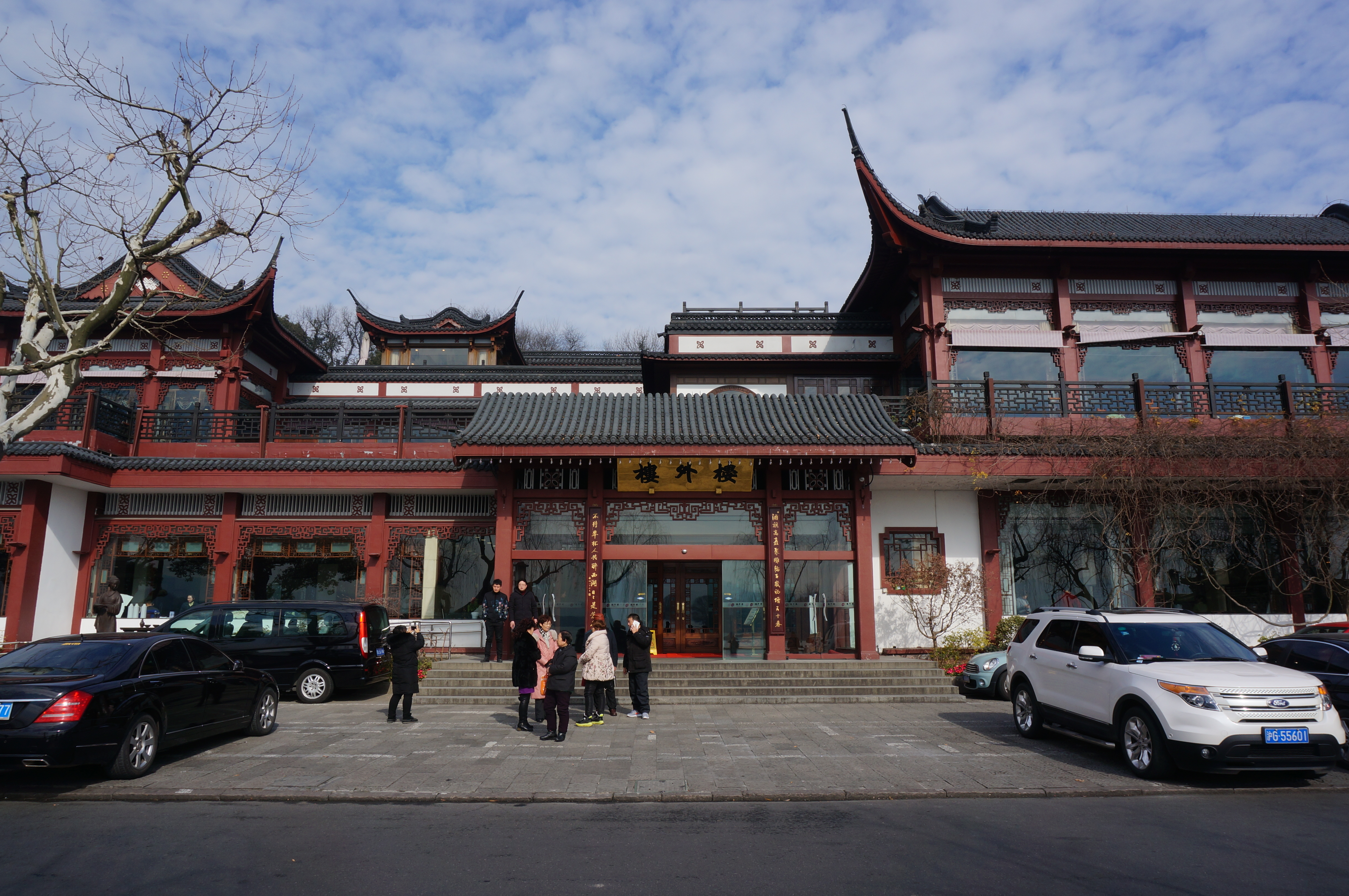 楼外楼孤山路店，东面入口。